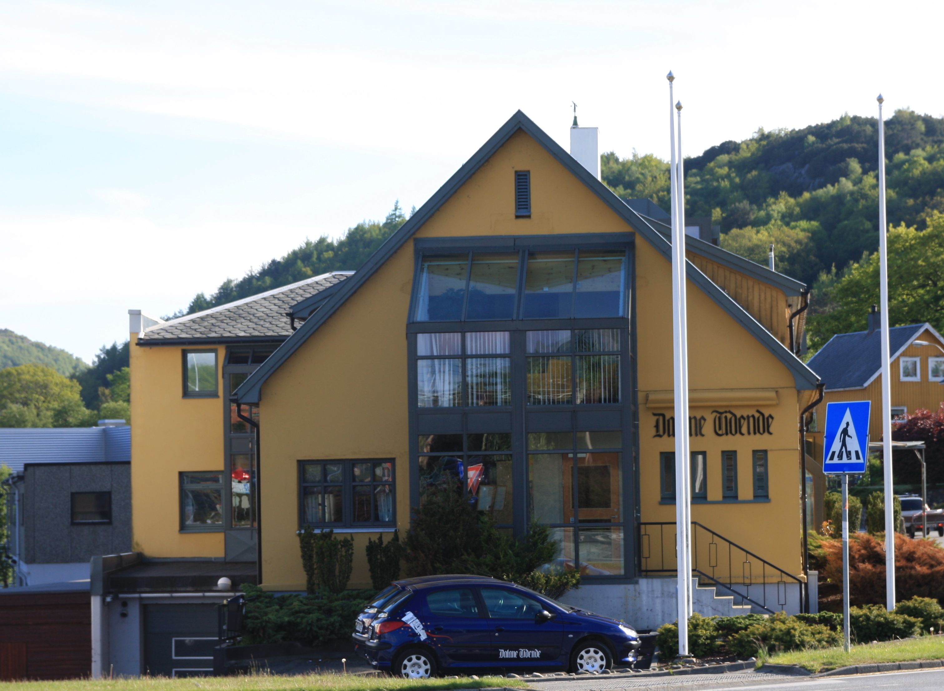 Dalane Tidende